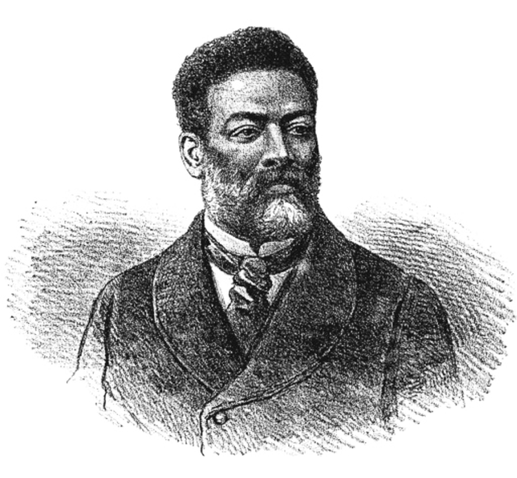 Desenho de Angelo Agostini retratando o abolicionista brasileiro, Luiz Gama.